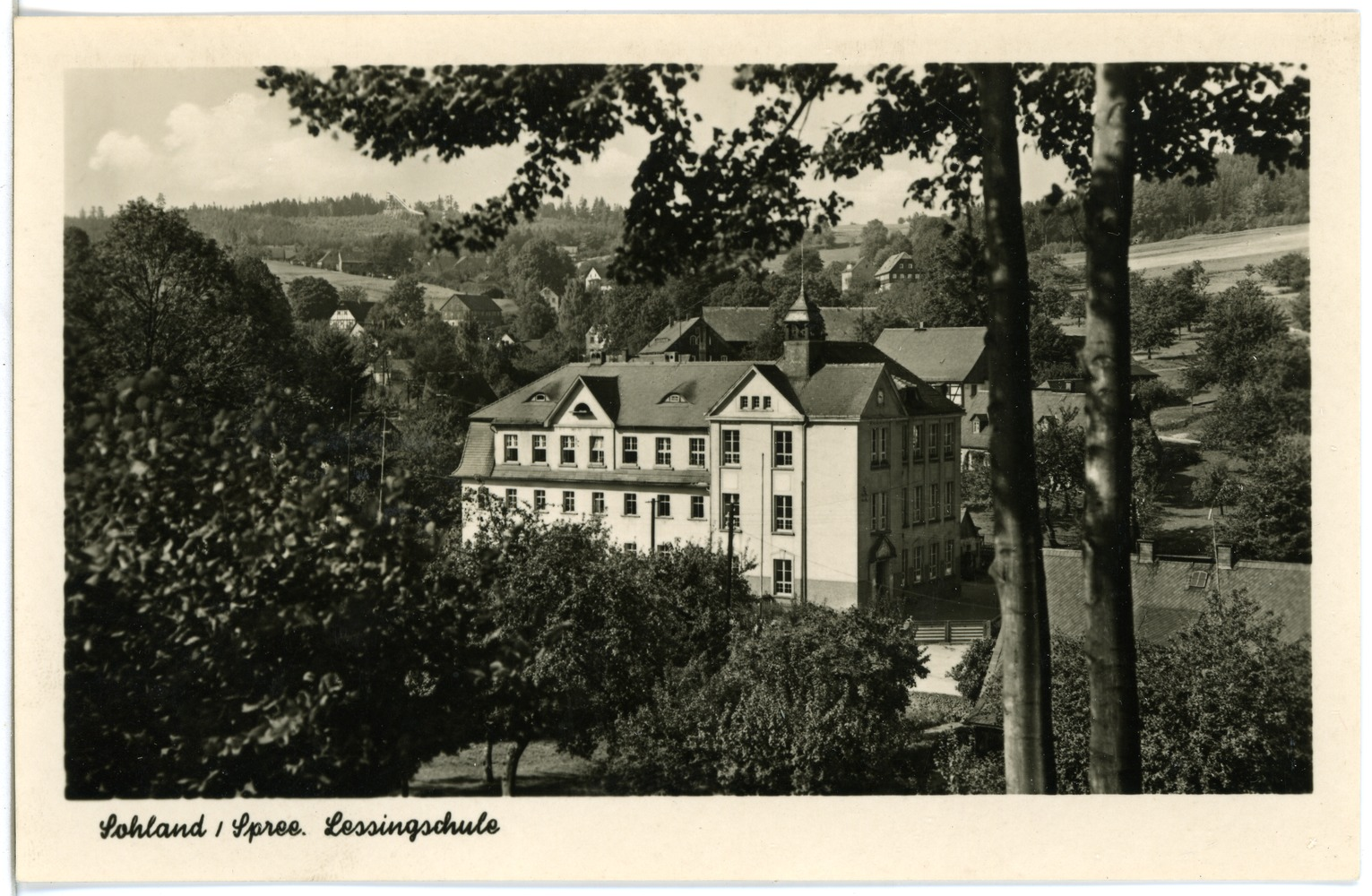 Sohland; Lessingschule This postcard is from publisher Brück & Sohn in Meißen ( postcard has a unique number 28720 and is available in a higher resolution at the publisher. This images was uploaded in a cooperation project between Wikipedians and the publisher.